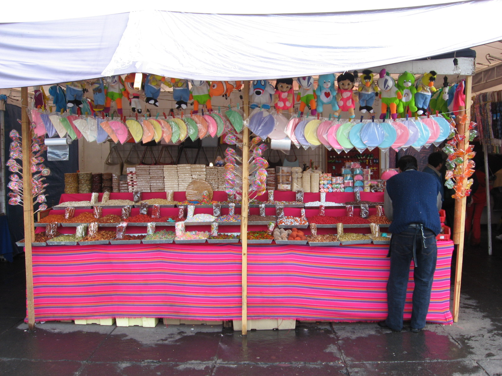 Puesto de Dulces mexicanos